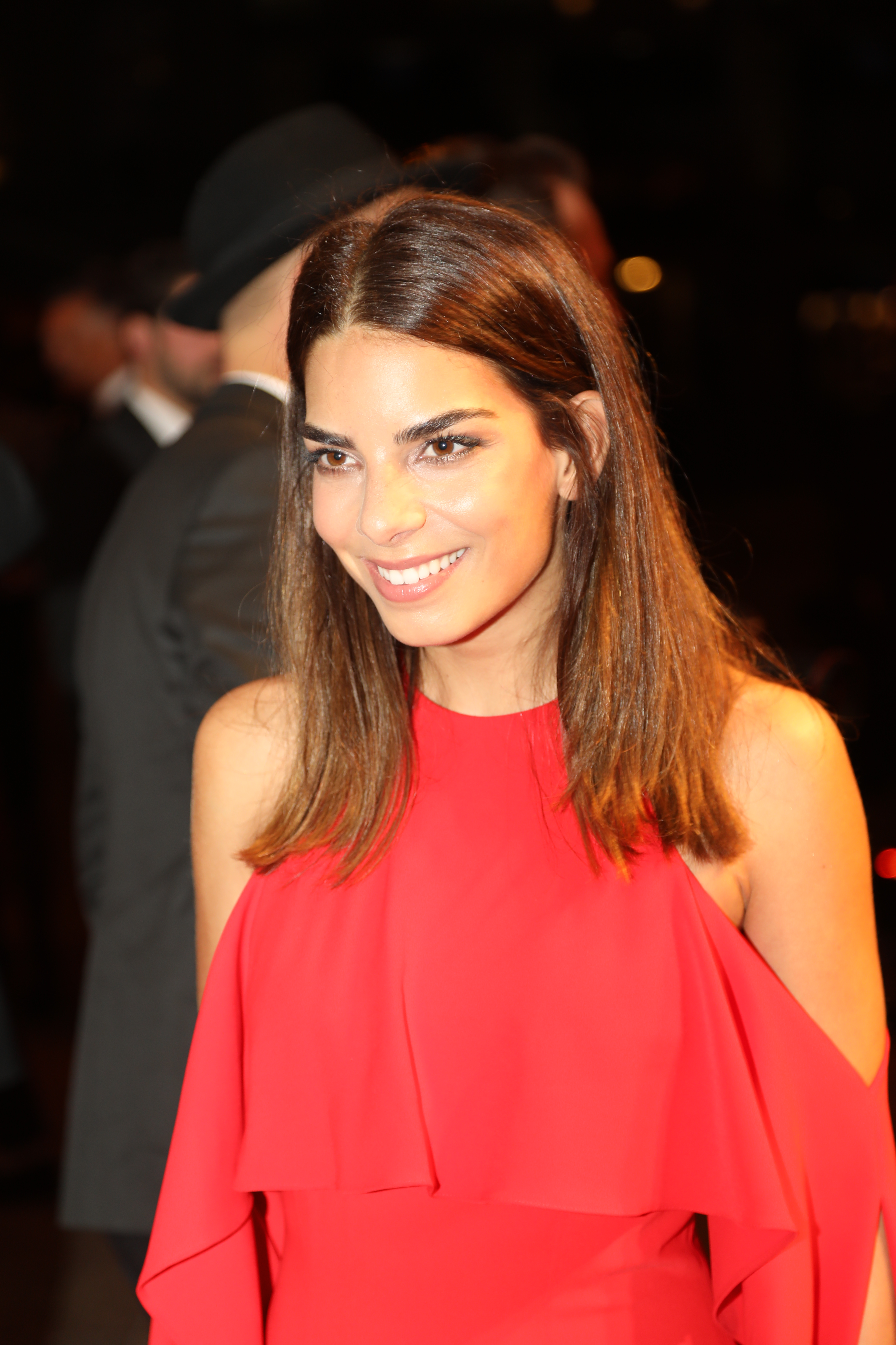 Lilli Hollunder beim Hessischen Film- und Kinopreis 2017